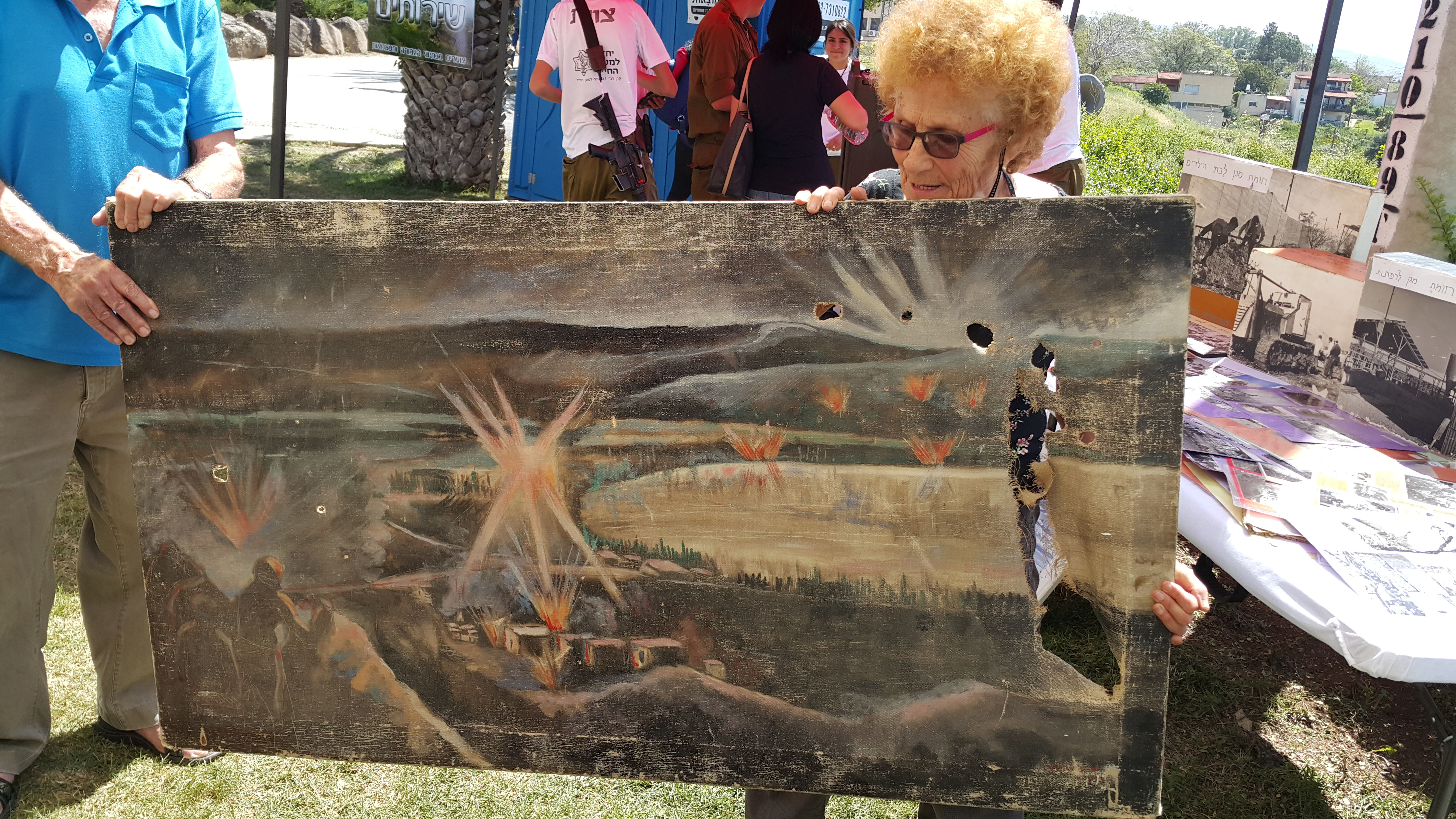 ציור סורי שנלקח שלל מהמחנה הנטוש בתאופיק בסיום מלחמת ששת הימים